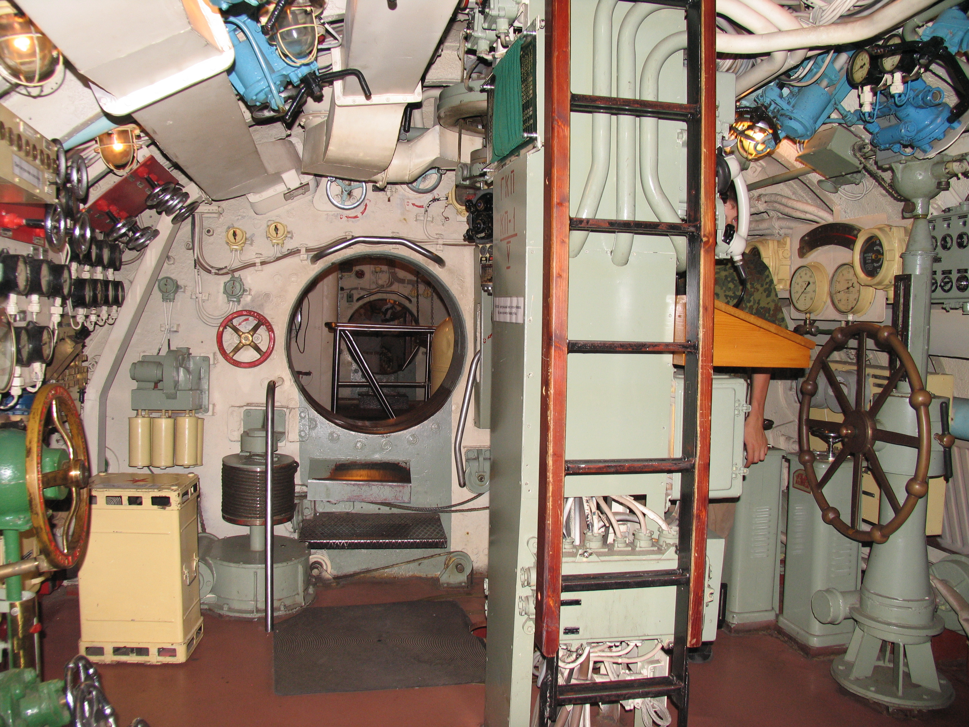 Подводная лодка Д-2 «Народоволец». Четвертый отсек. Общий вид.